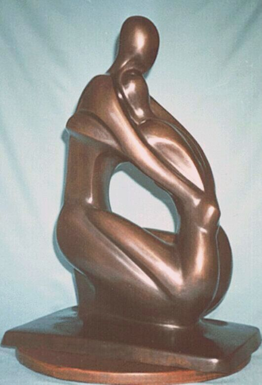 זוג